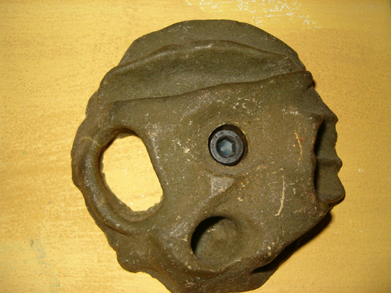 Zicht op klimgreep